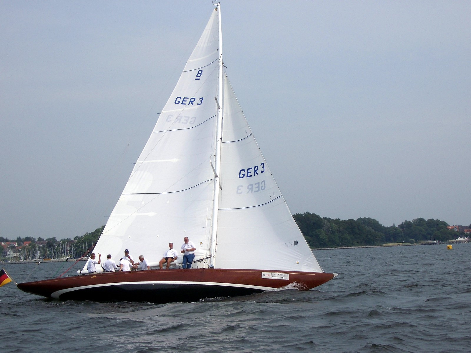 Segelboot der Bootsklasse 8 Meter-Klasse (8mR) auf der Kieler Förde. Yacht Name: Feo Designer: Charles E. Nicholson Builder: Camper & Nicholsons - Gosport 1927